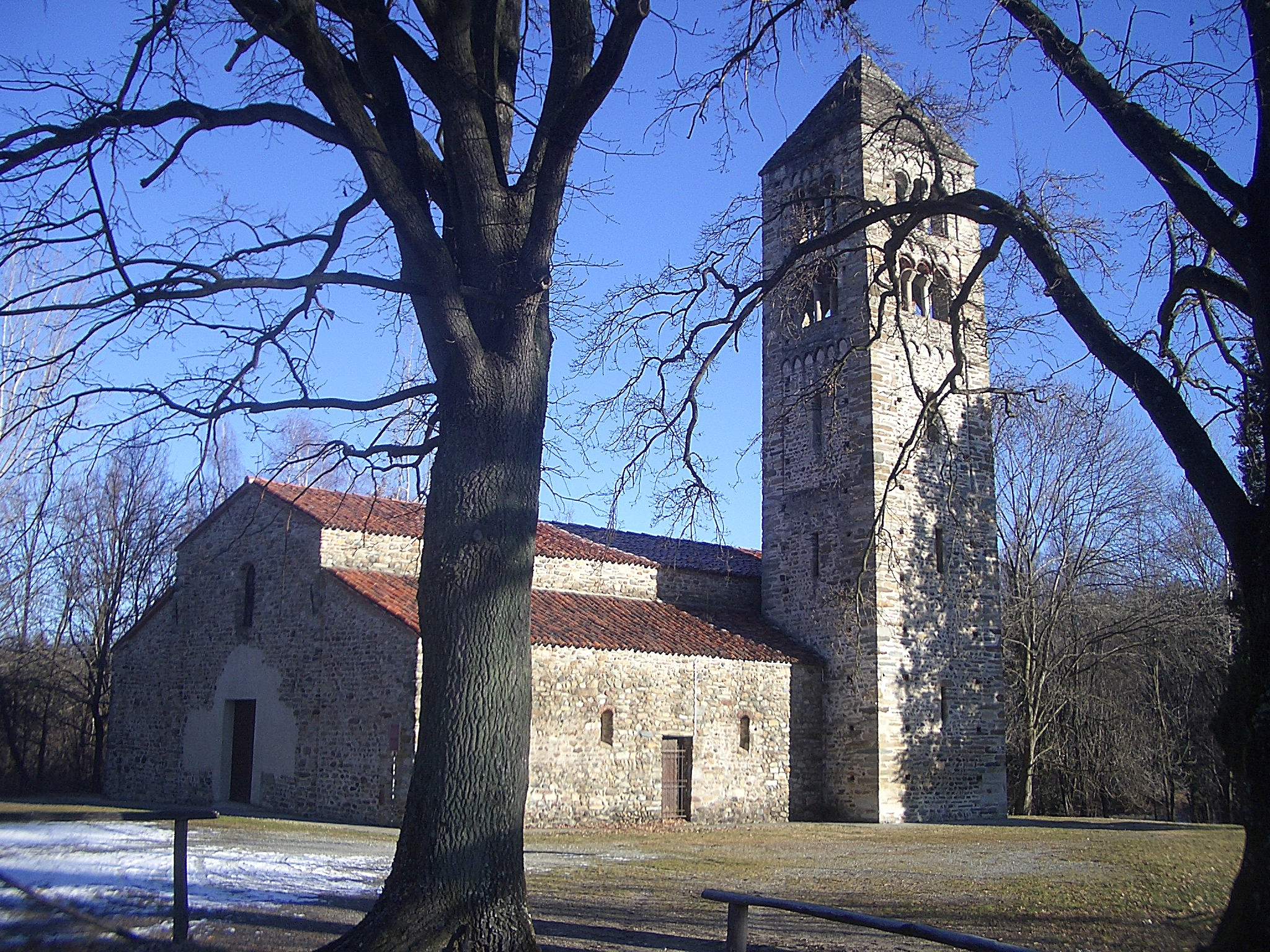 San Secondo church, XI century, Magnano, Biella, Italy